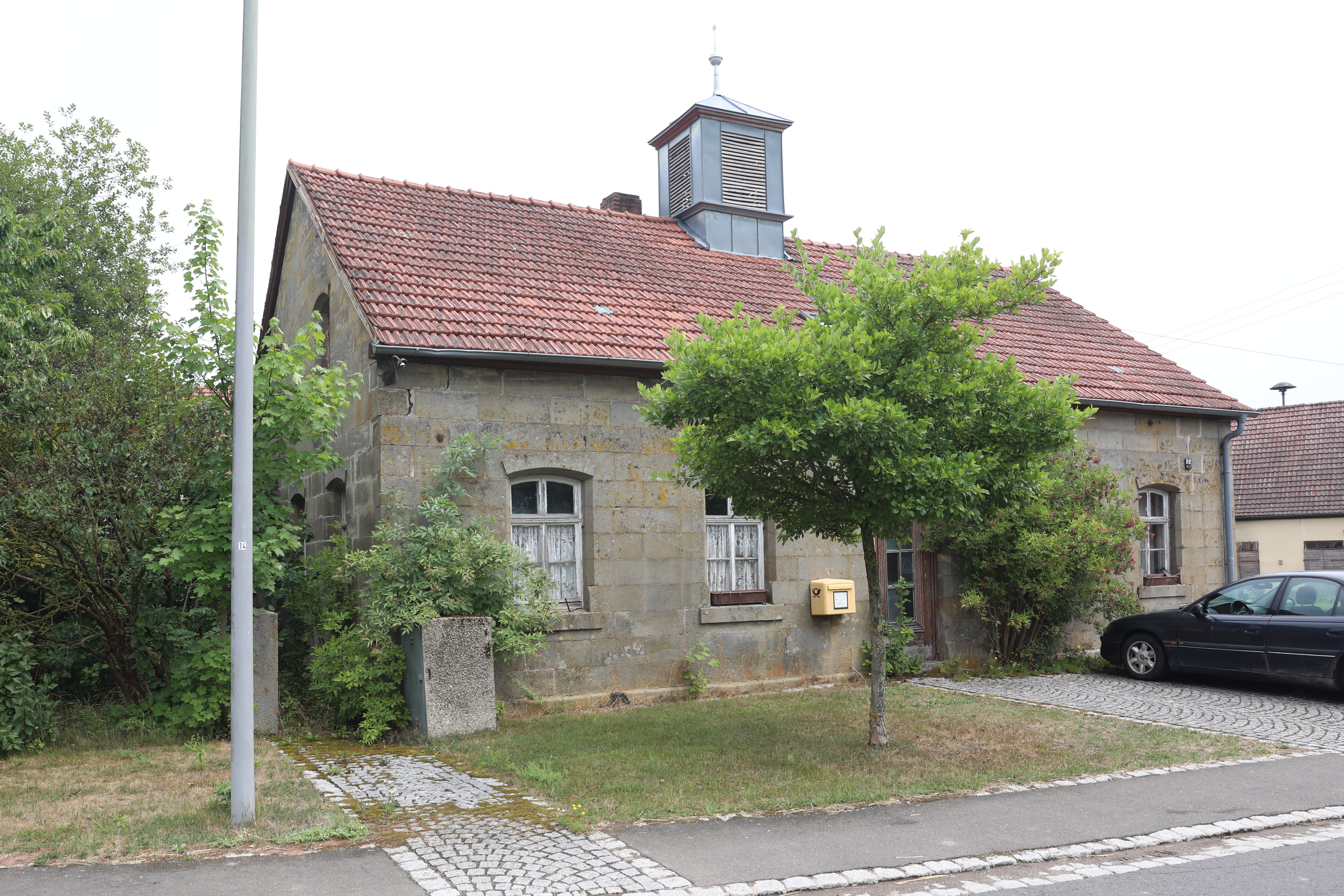 Alte Schule in Brünn